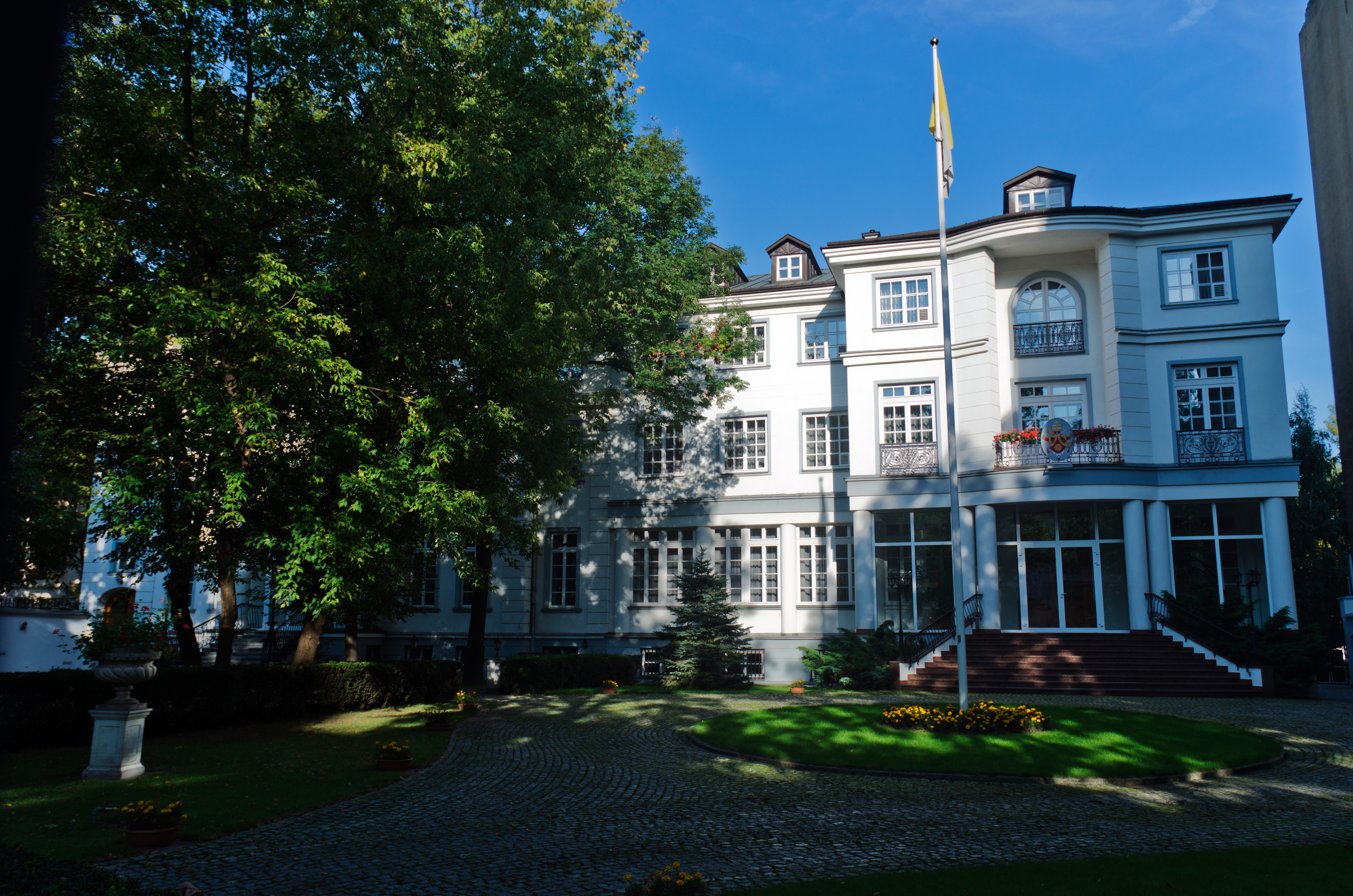 Warszawa - Nuncjata Apostolska, Aleja Jana Chrystiana Szucha 12